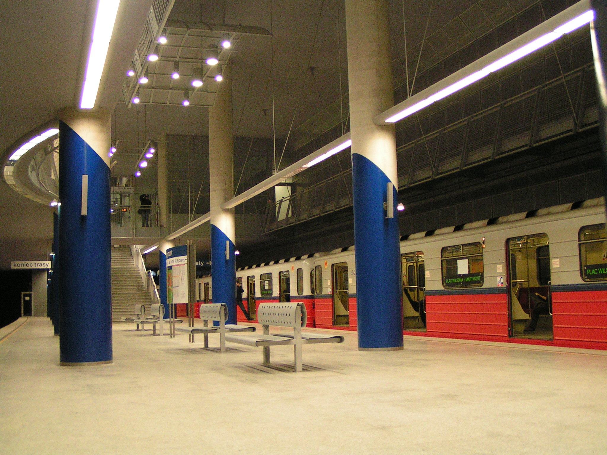 Stacja Marymont